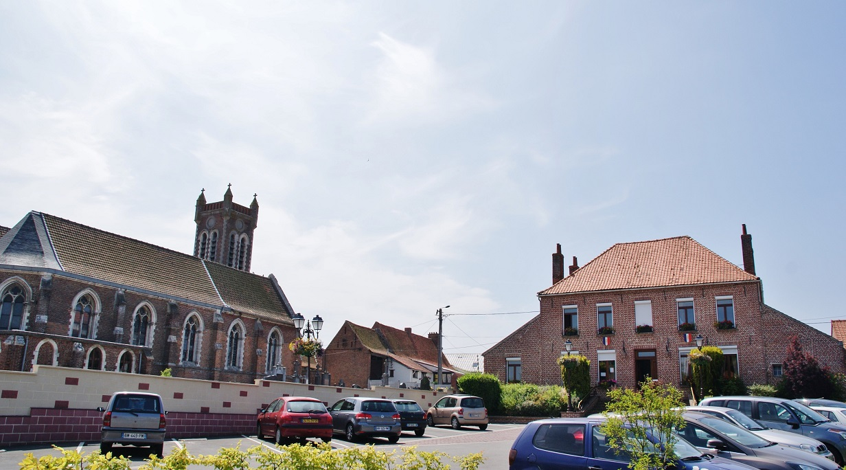 La Mairie et L'église Notre-Dame de L'Assomption